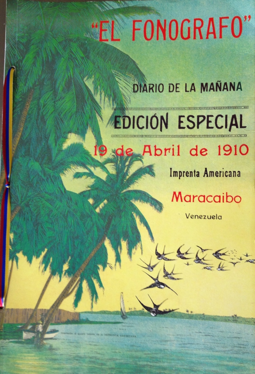 Portada de la edición especial del diario "El Fonógrafo" de Maracaibo, del 19 de abril de 1910.